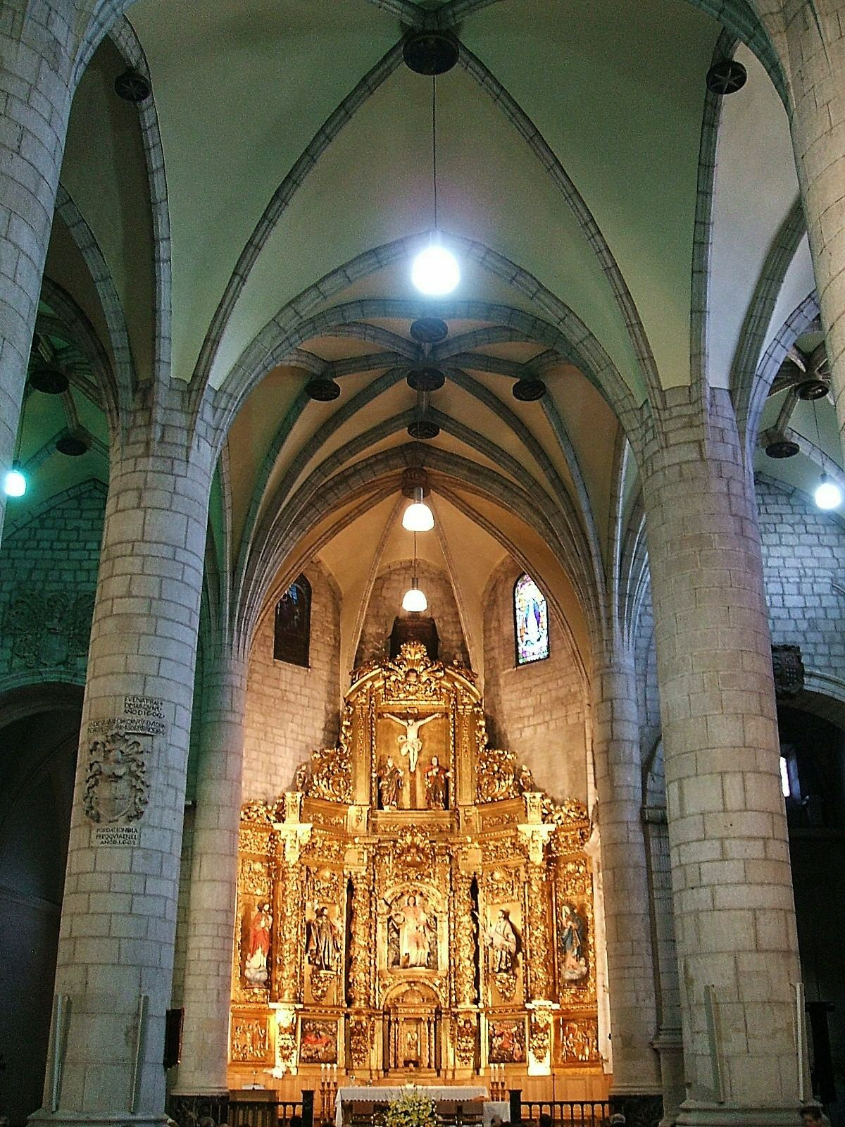 Cabecera y Capilla Mayor de la iglesia de San Vicente Mártir, Vitoria-Gasteiz, España/Spain